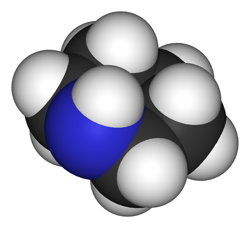 Piperidin-3D